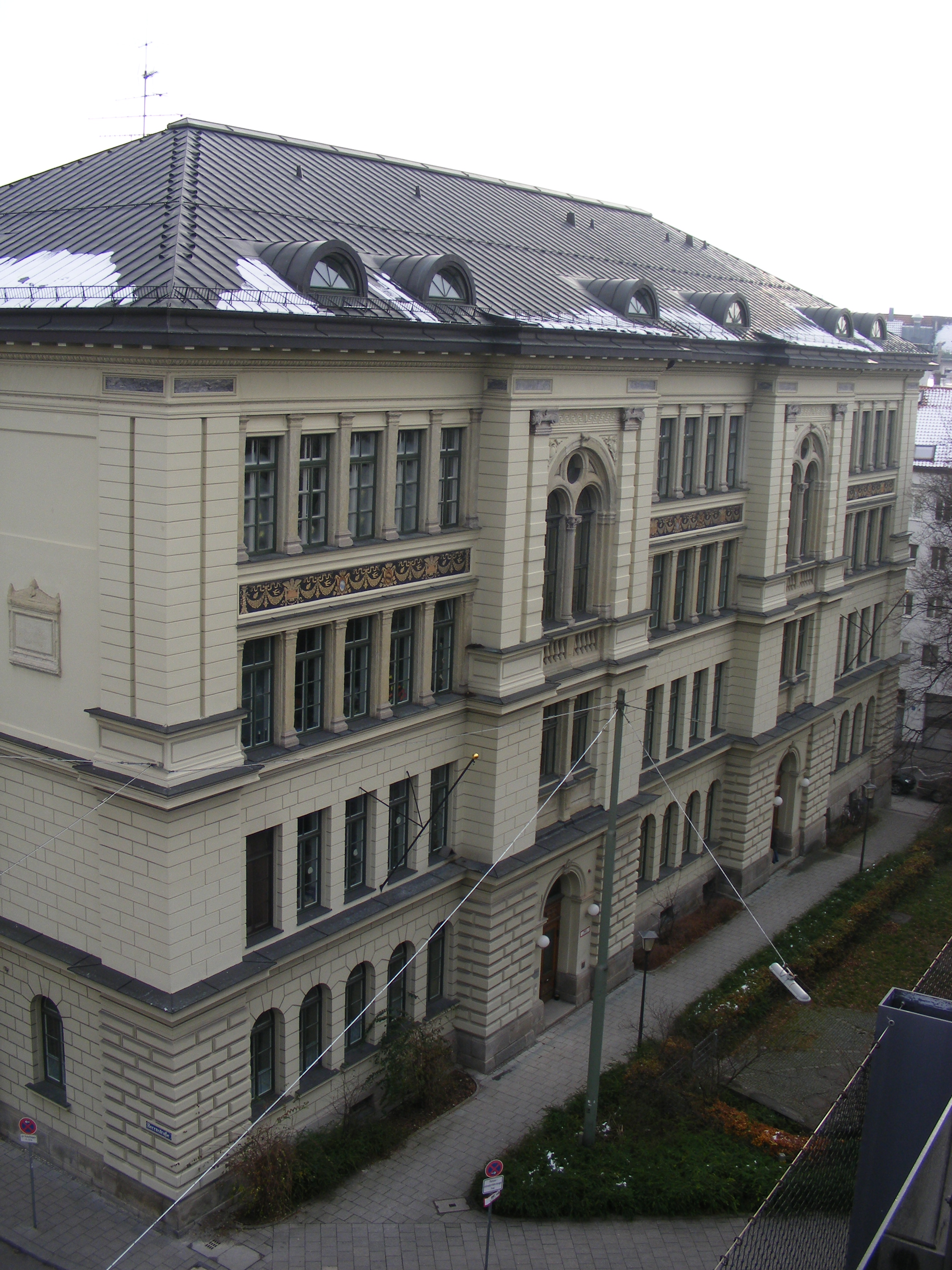 Schaufassade der Schule an der Herrnstraße, München